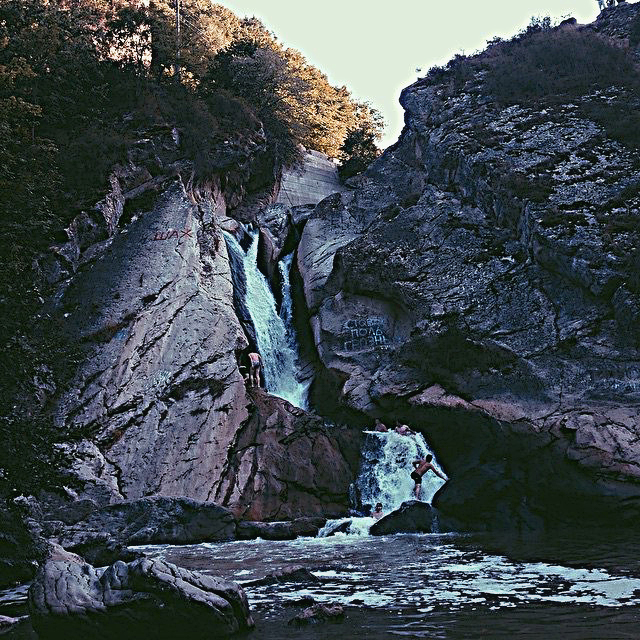 Водопад. Хучни